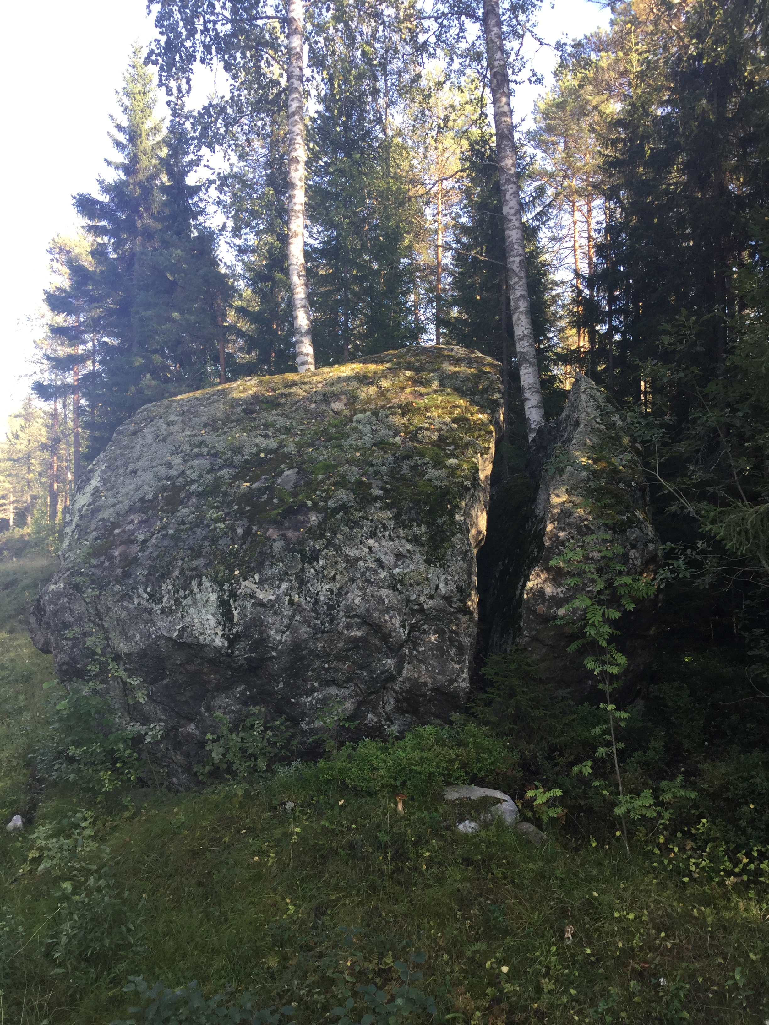 Mjölkstenen eller Vargstu-stenen utanför Lövånger